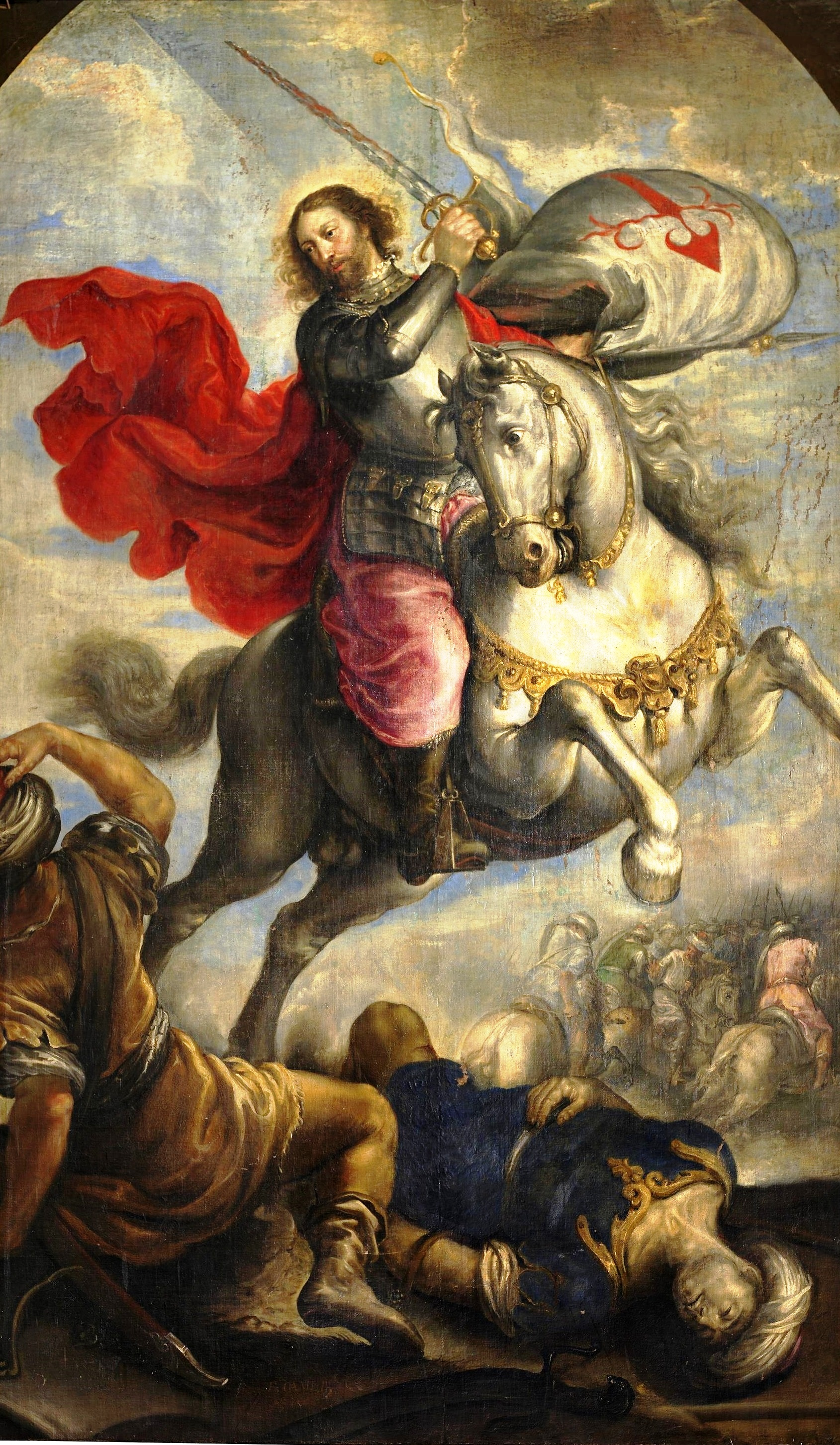 La obra representa al apóstol Santiago el Mayor, que según la leyenda intervino en la legendaria batalla de Clavijo, a caballo y derrotando a los musulmanes.